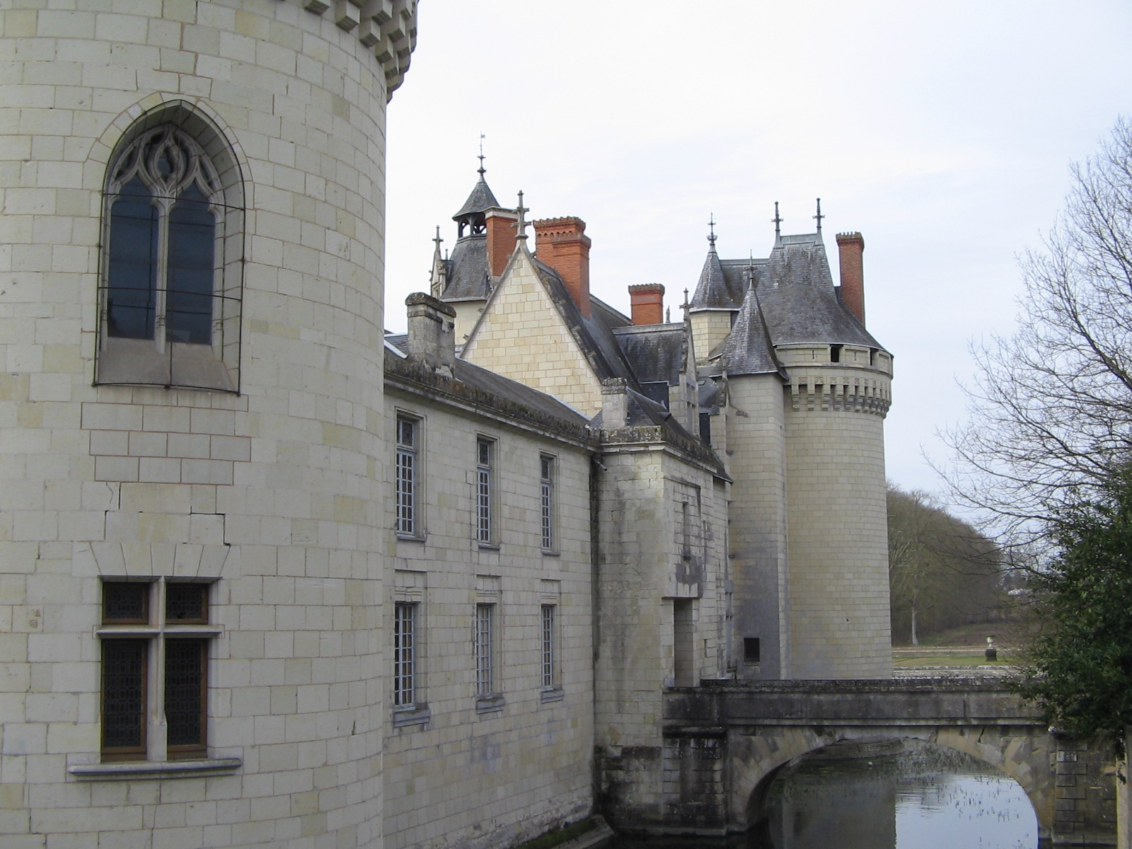 Le château de Dissay en avril 2010